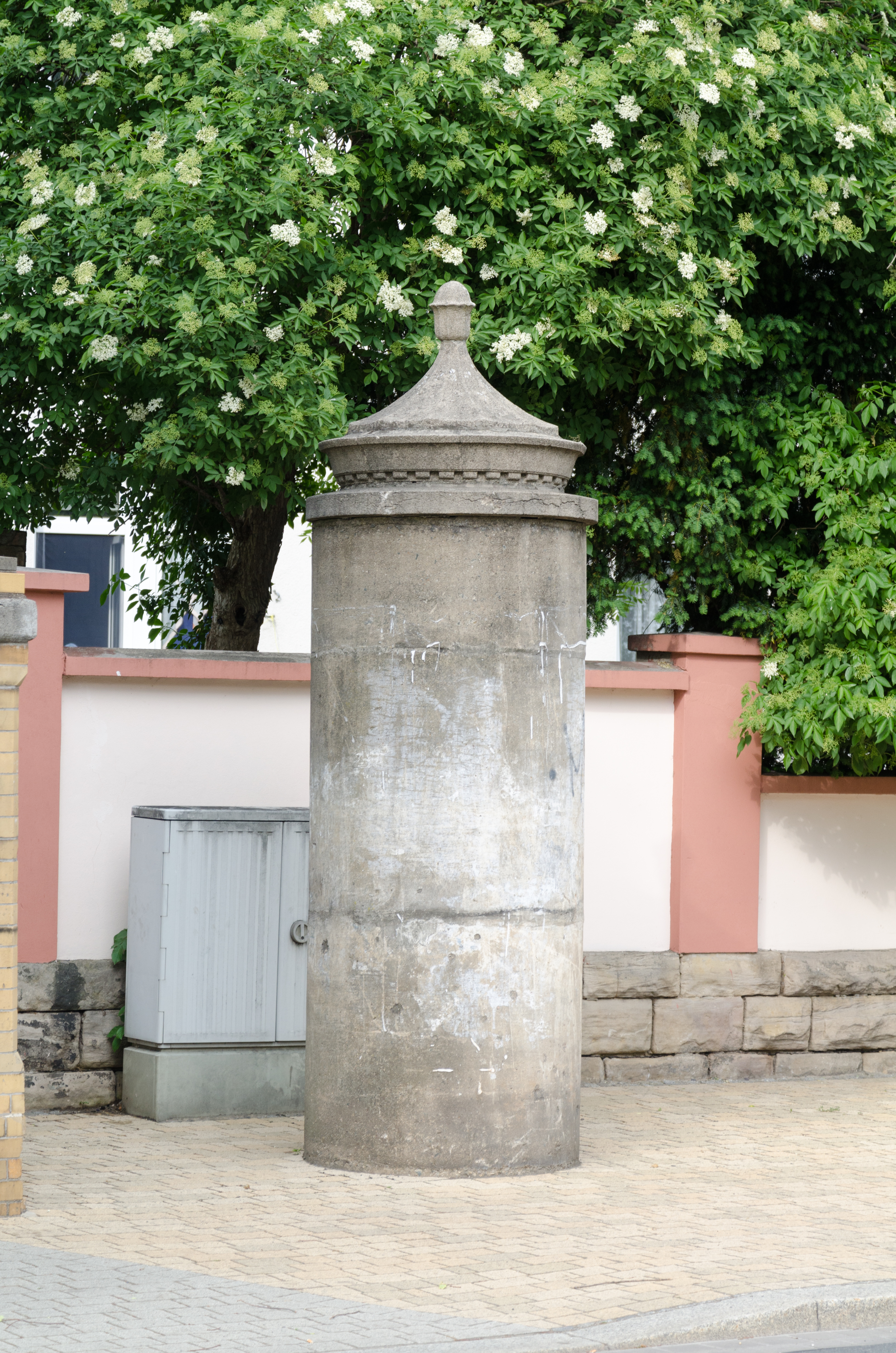 Zeitz, Litfaßsäule, Am Kalktor